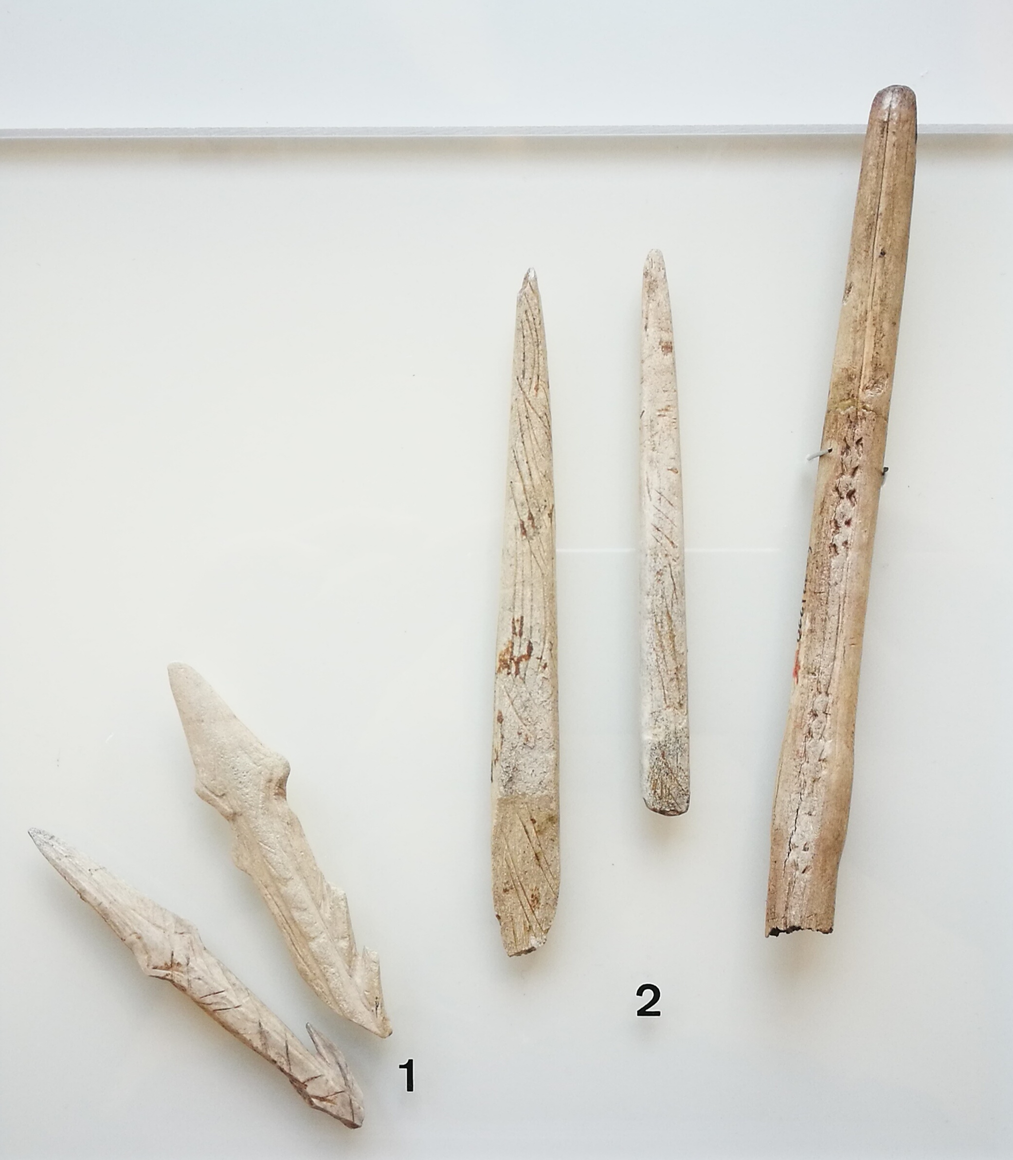 Deutschland (D) - Baden-Württemberg (BW) - Landkreis Konstanz (KN) - Singen - Archäologisches Hegau-Museum: 1) Harpunen, Engen, ca. 14.000 v. Chr. 2) Speerspitzen, Engen, ca. 14.000 v. Chr. Mit Genehmigung durch Herrn Ralph Stephan M.A., Museumsleitung Hegau-Museum Singen Am Schlossgarten 2 D-78224 Singen